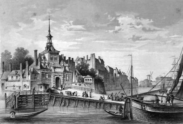 Ooster Oude Hoofdpoort naar een gravure van L. Rohbock uit 1863